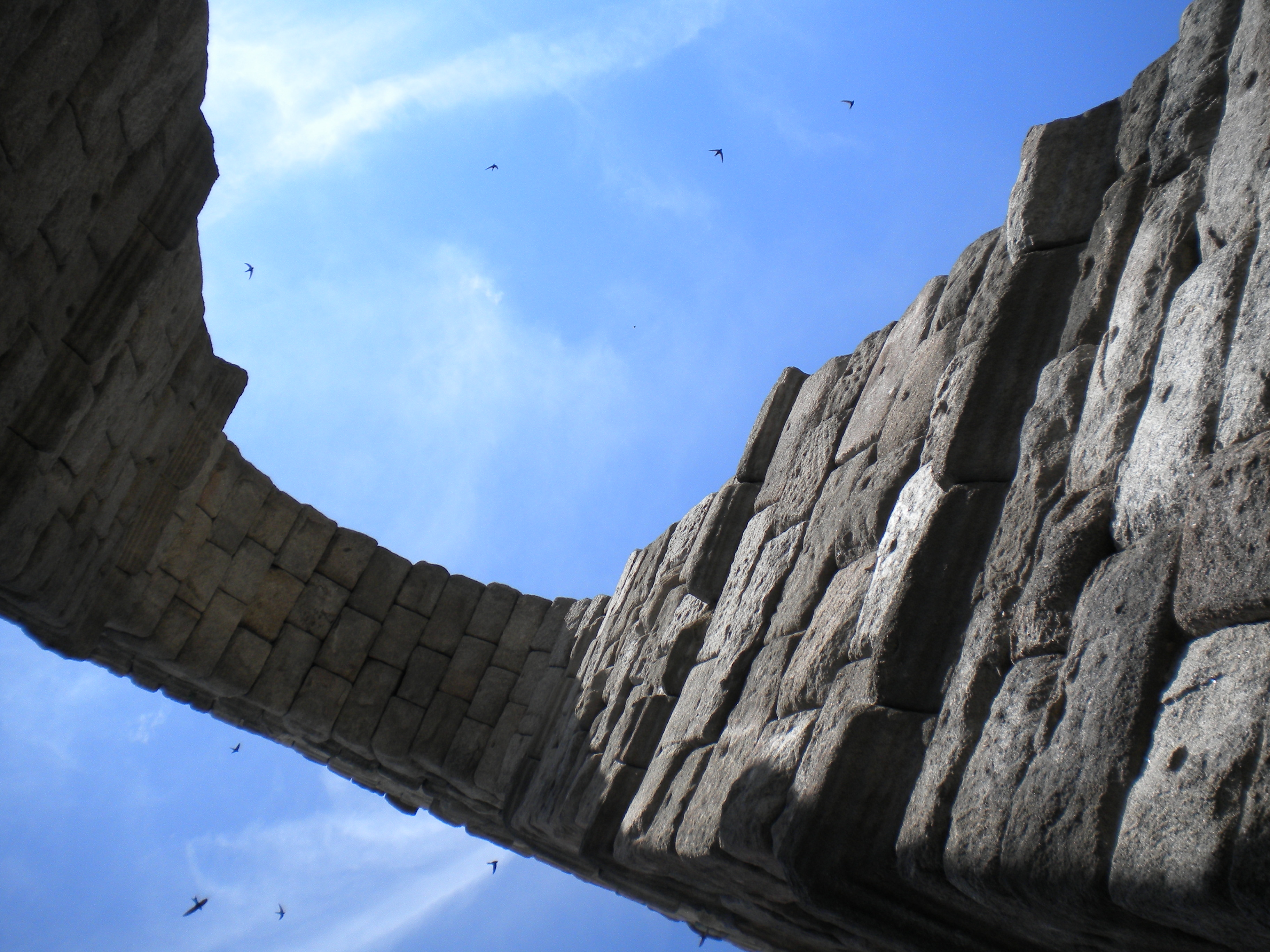 Acueducto de Segovia Espana